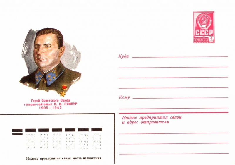 Художественные маркированные конверты 1980 года.